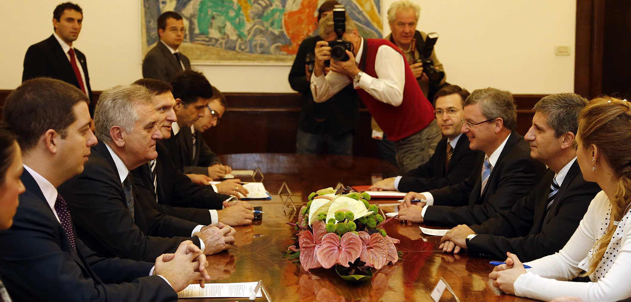 Belgrad, 29.11.2012, Arbeitsbesuch Serbien, VK Michael Spindelegger trifft den serbischen Präsidenten Tomislav Nikolic.